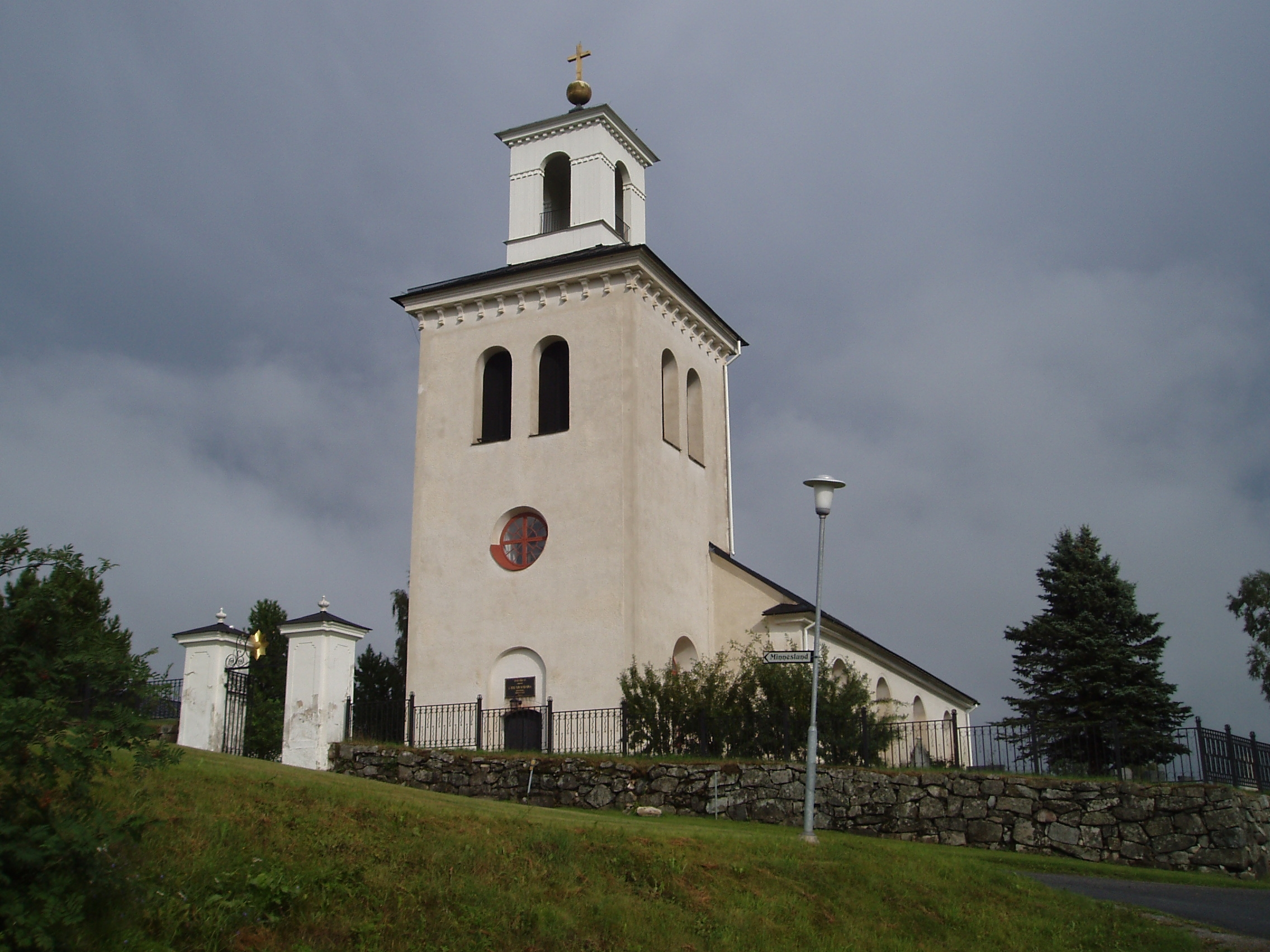 Ljustorps kyrka i Medelpad, Sverige